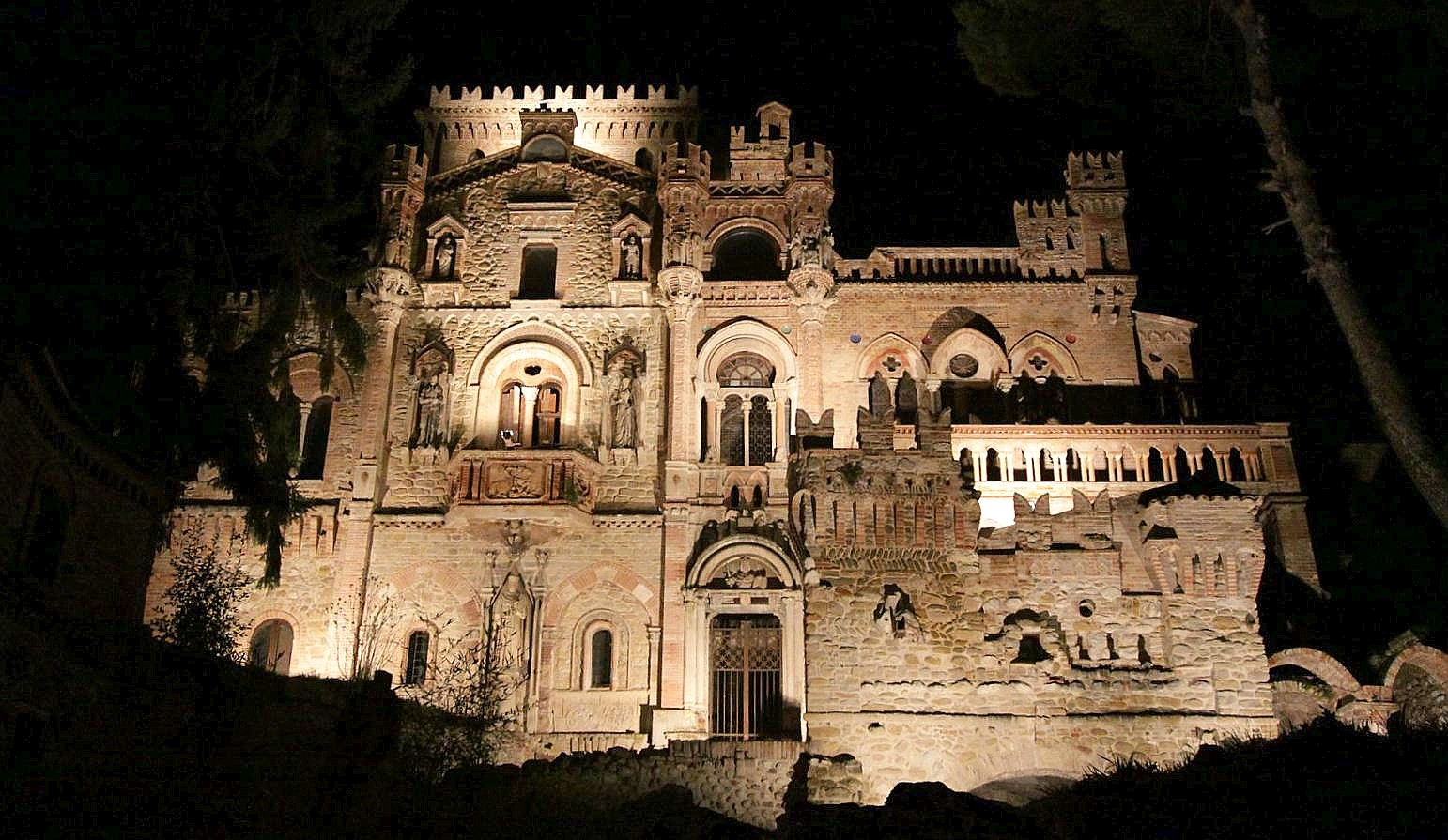 Il Castello illuminato in notturna Licensing Categoria:Immagini di Teramo